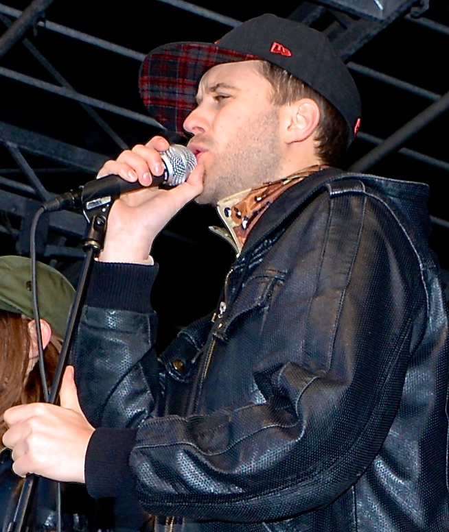 Antirasistdemonstrationen i Kärrtorp den 22 december 2013.